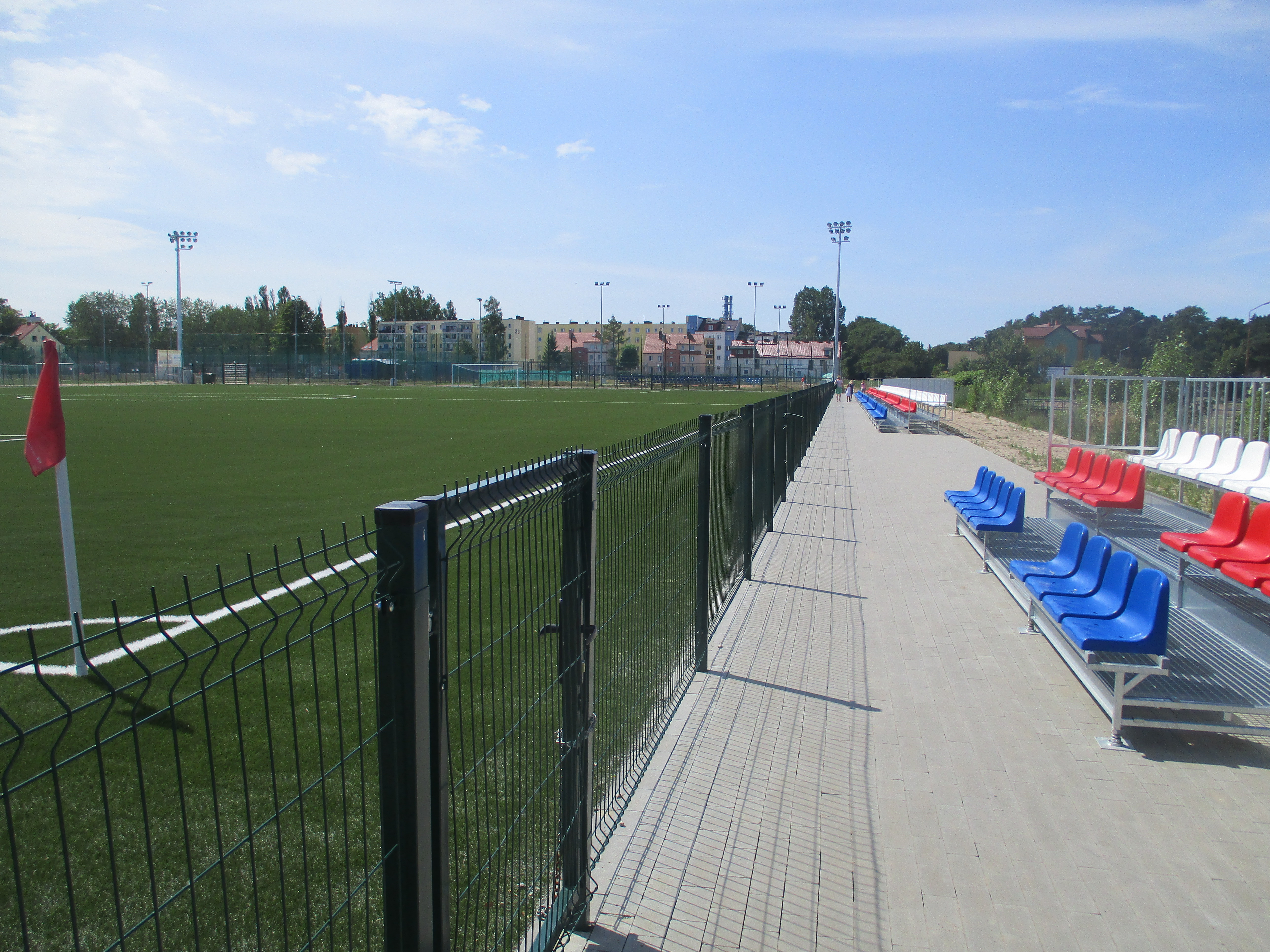 Ustka; OSiR- boiska